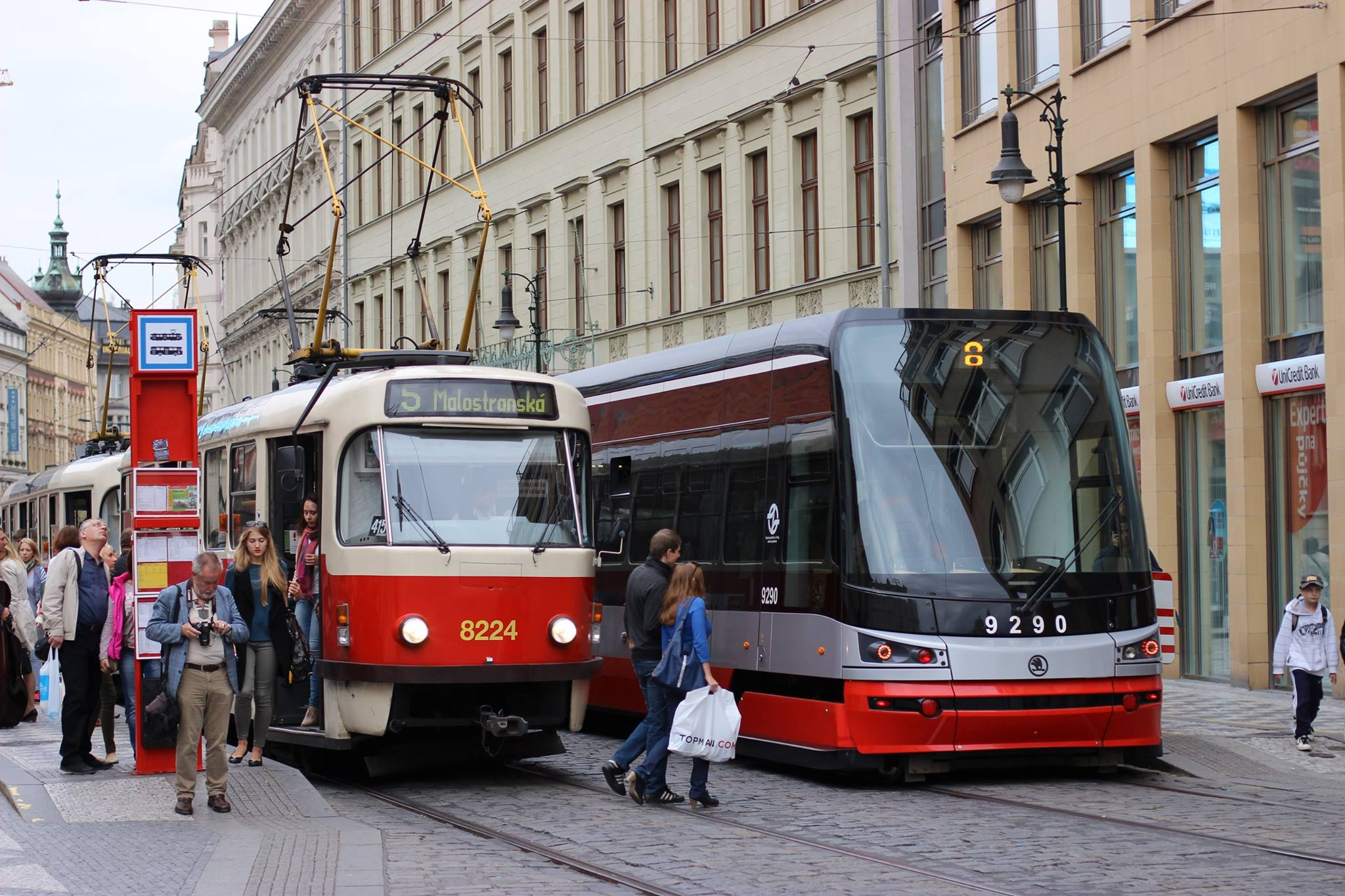 Tramvaj Tatra T3 a Škoda 15T v Praze